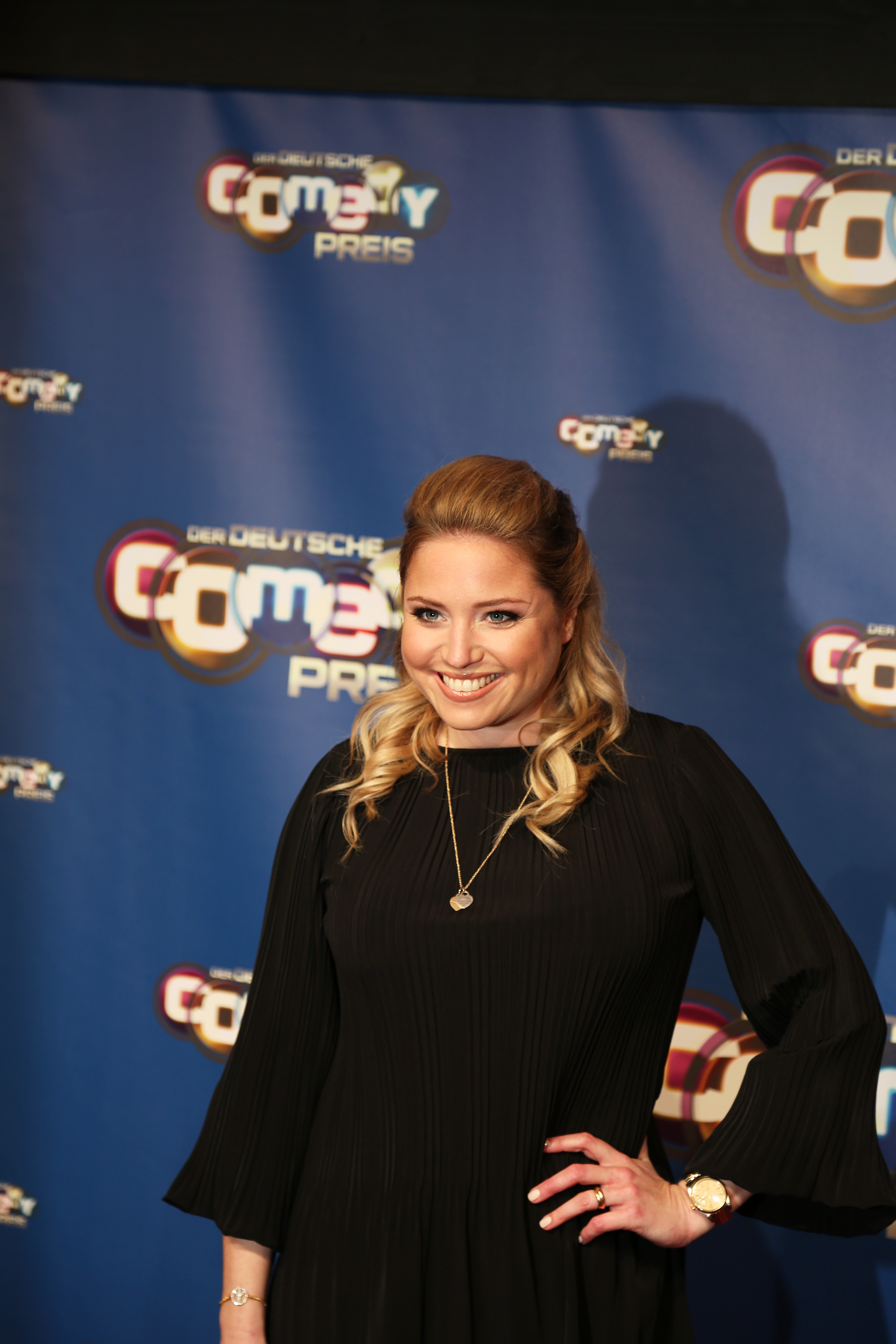 Caroline Frier beim Deutschen Comedypreis 2017.